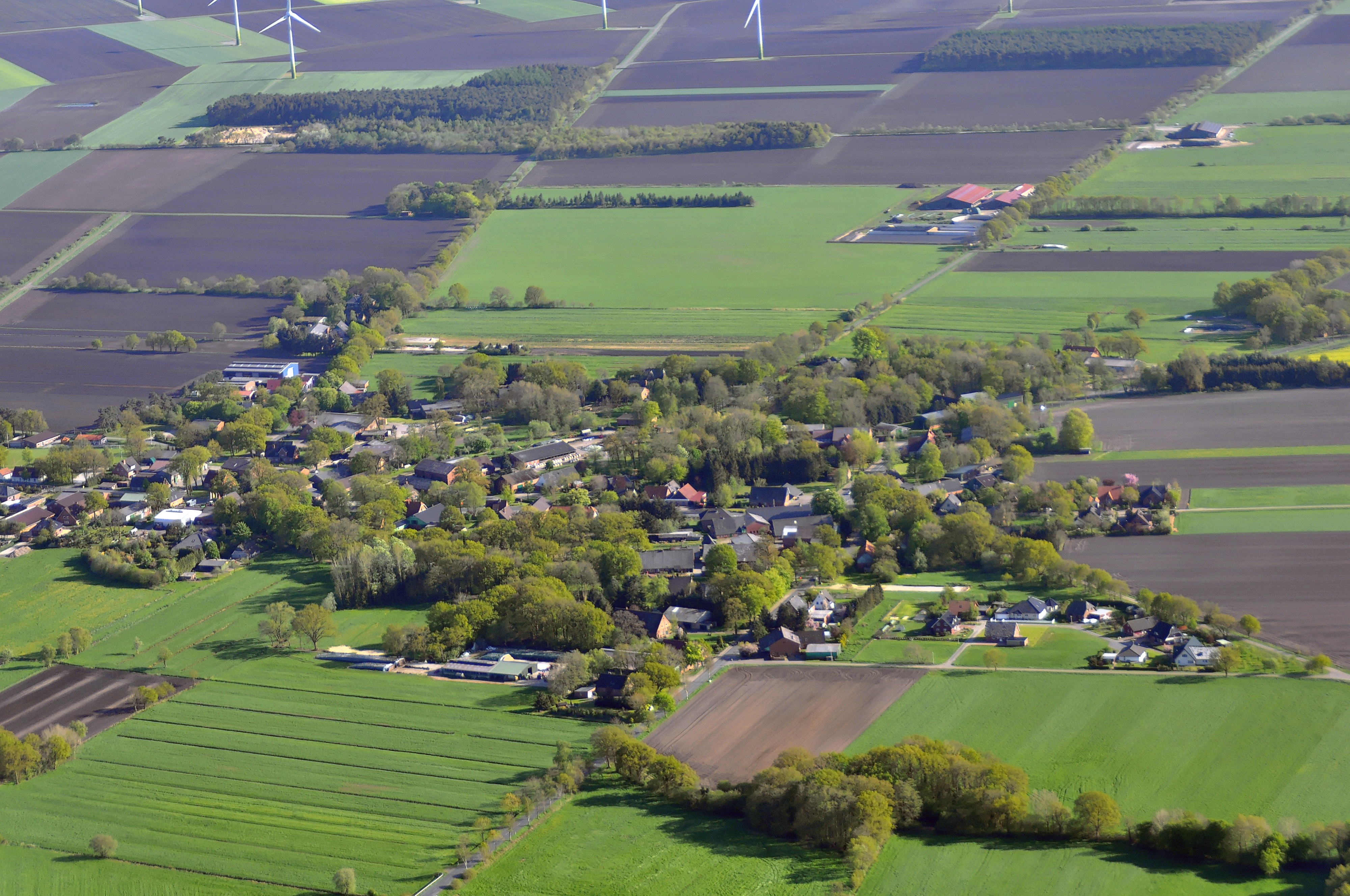 Luftbilder von der Nordseeküste 2012-05